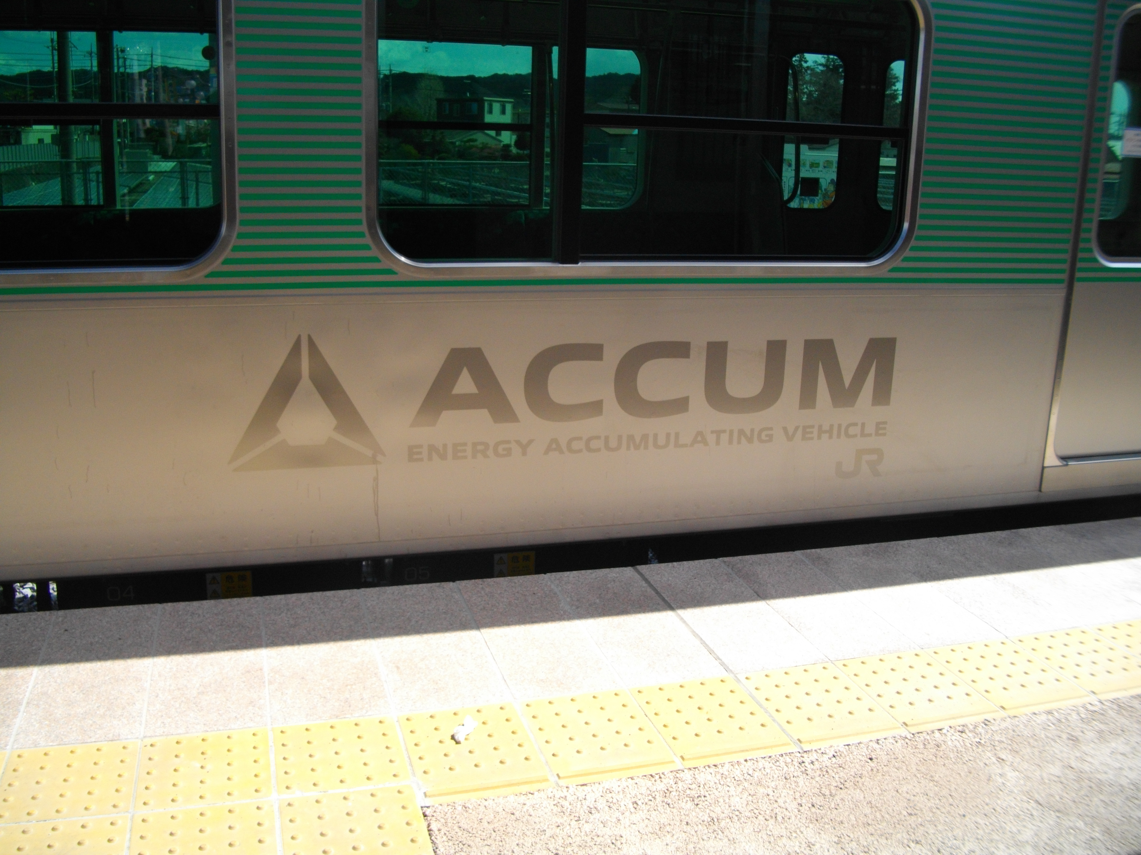 EV-E301系の車体に描かれたロゴと愛称。烏山駅にて。